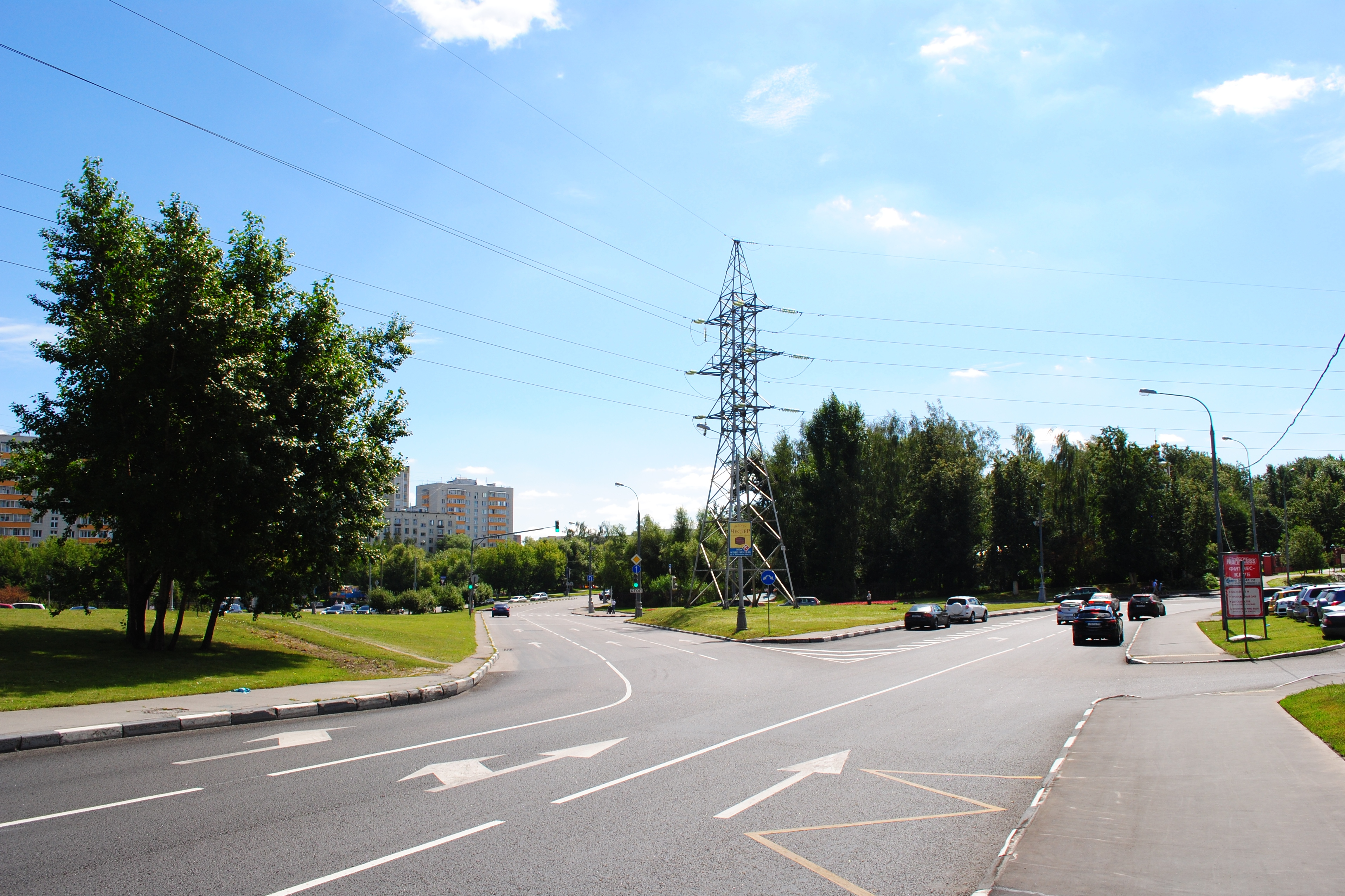 Улица Академика Пилюгина (справа) и проезд к улице Архитиектора Власова (слева)